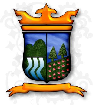 Escudo de Jarabacoa